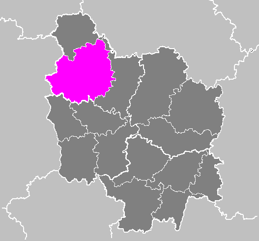 Maps of arrondissements and cantons of France: Arrondissement d Auxerre.PNG (Région Bourgogne)